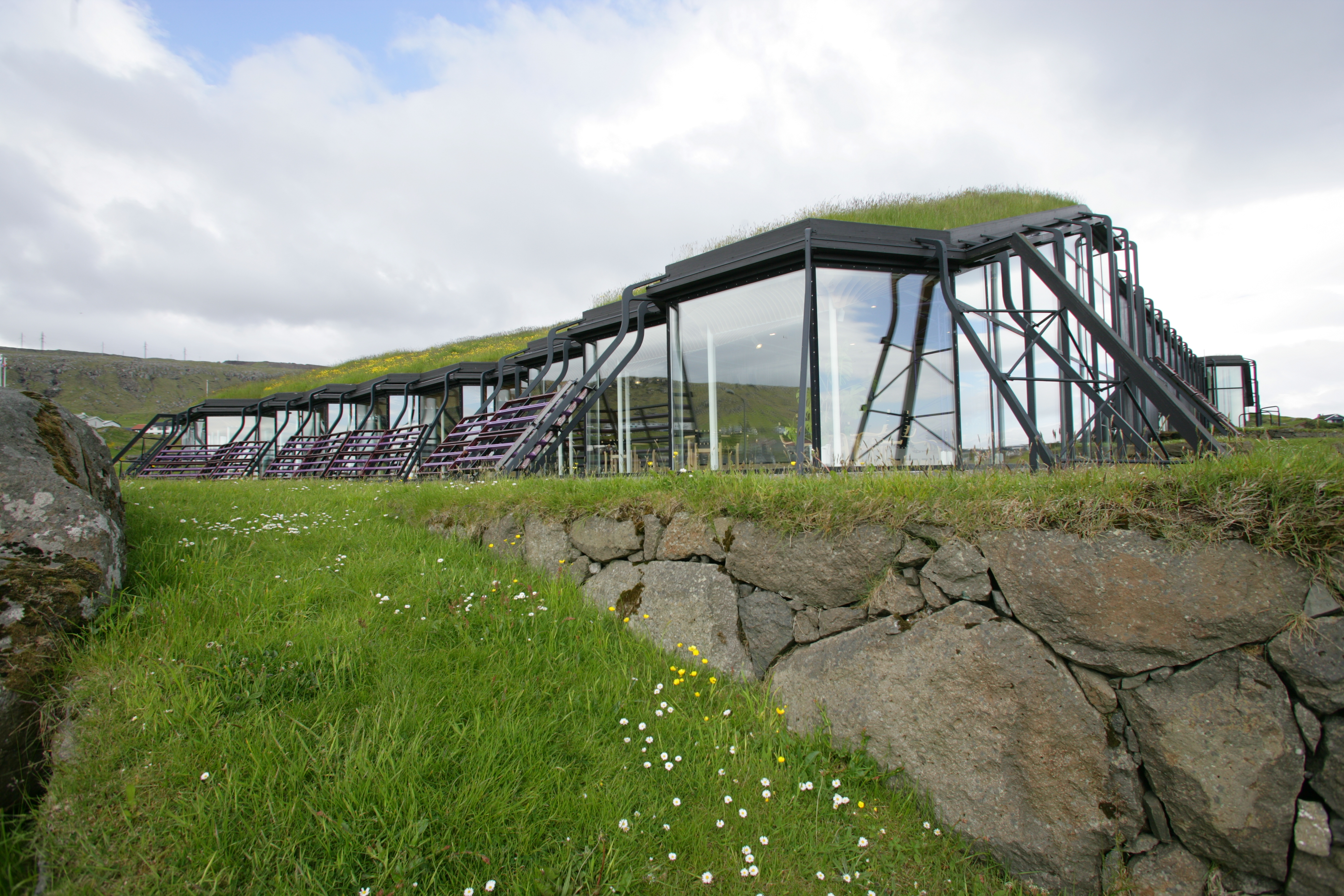 Nordens Hus på Færøerne